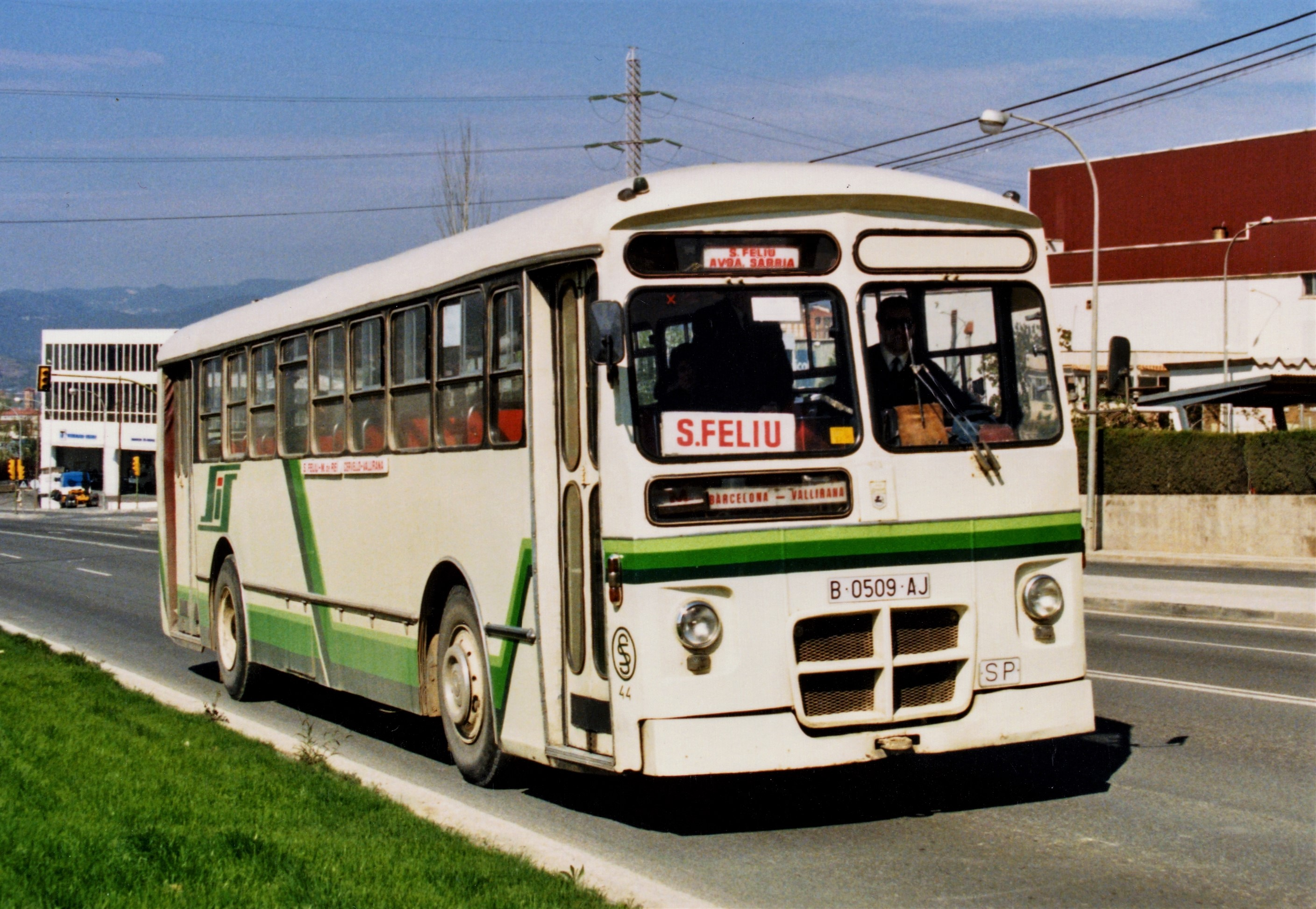 El autobús número 44 de Soler i Sauret, un Pegaso 6035/5, a su paso por Sant Just Desvern, prestando servicio en la línea suburbana de Sant Feliu de Llobregat a Barcelona-Avinguda de Sarrià.